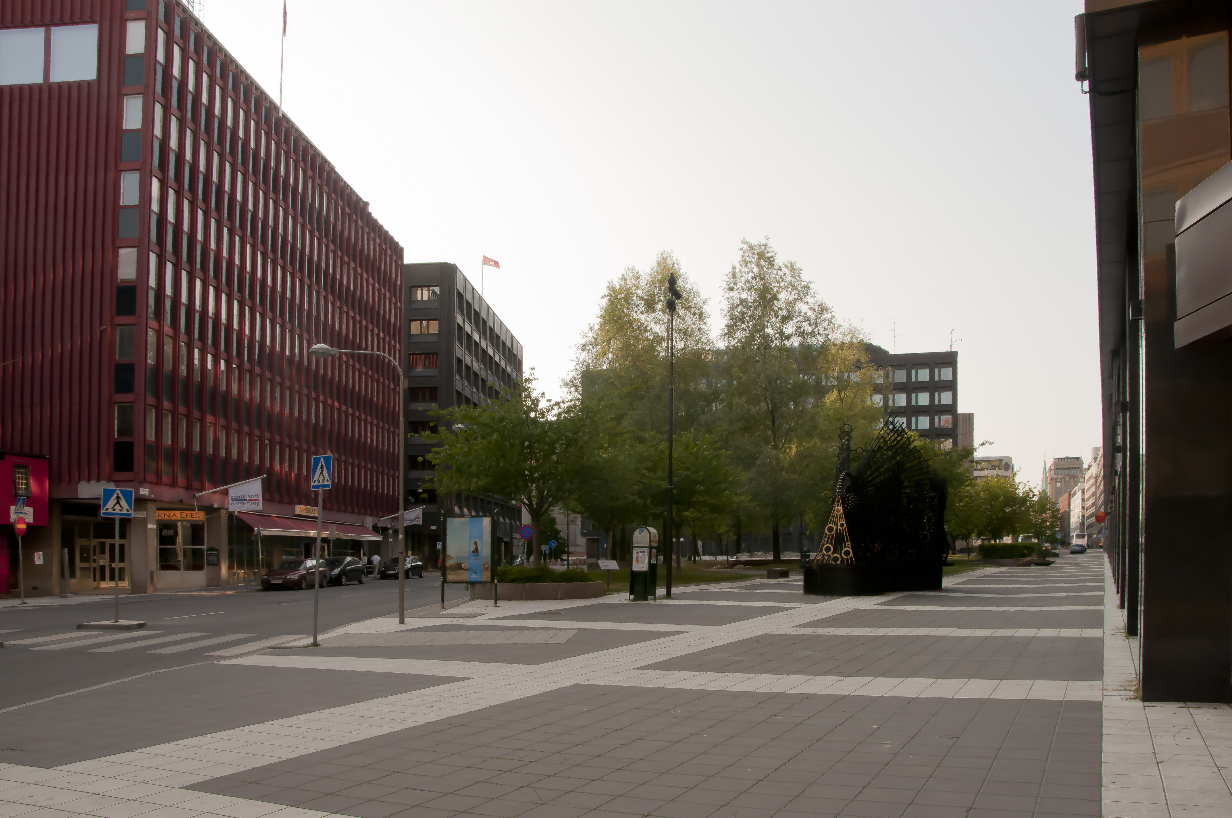 Brunkebergstorg 2010